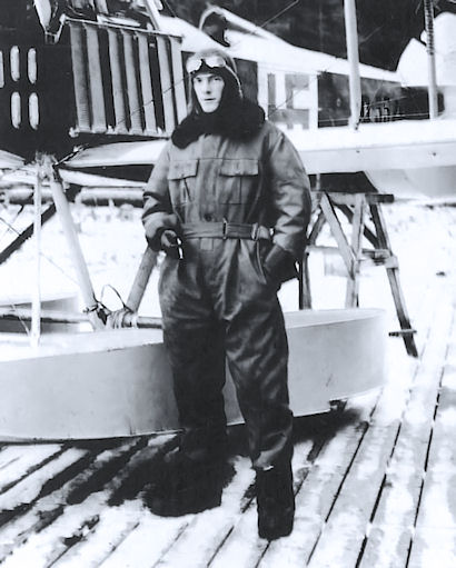 Kapteeni Harald Lilja N.A.B typ 17, D.55/18 hävittajän verellä Ilmailupataljoonassa kuvattuna.